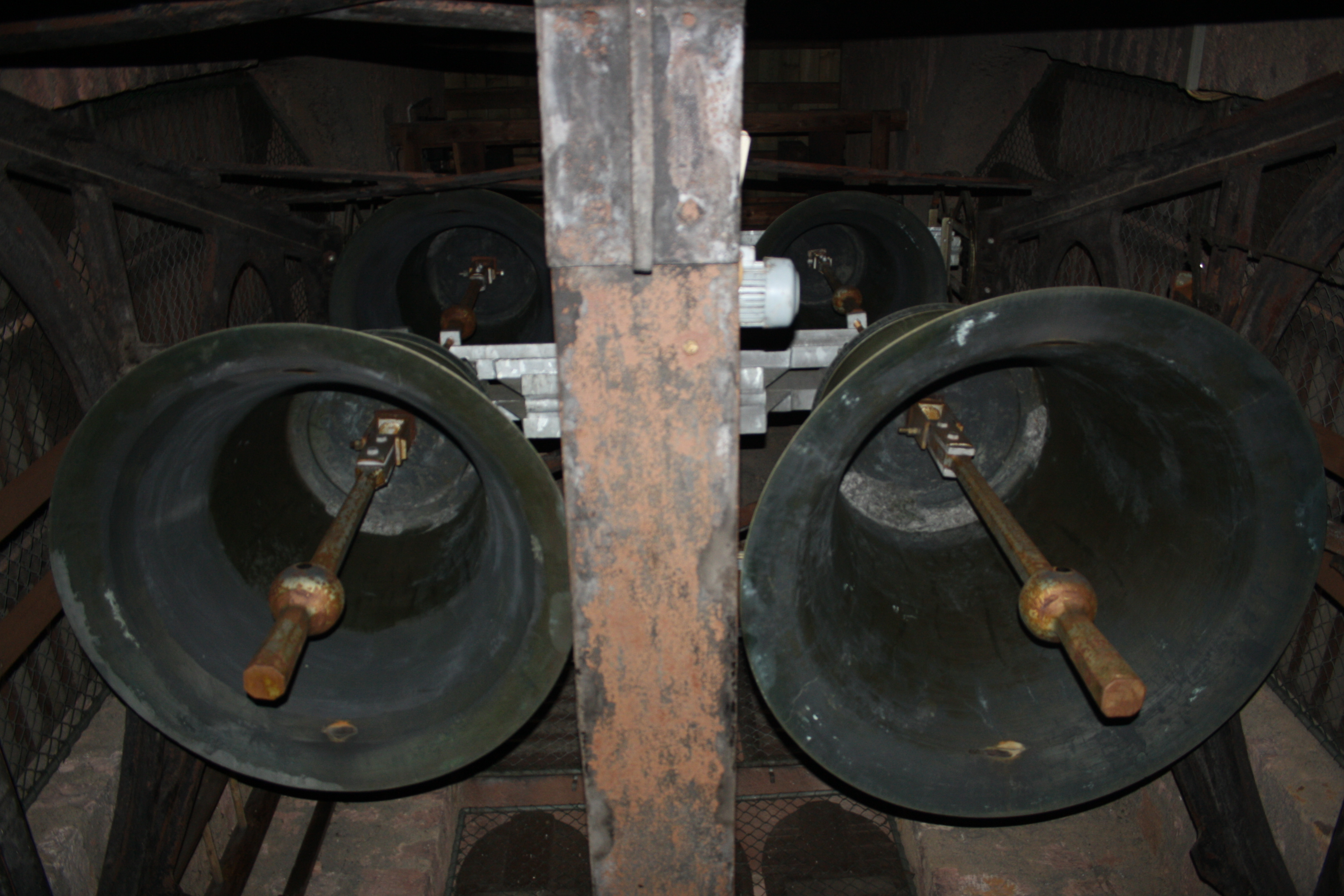 Die Glocken 2-5 der katholischen Pfarrkirche St. Bartholomäus Biblis